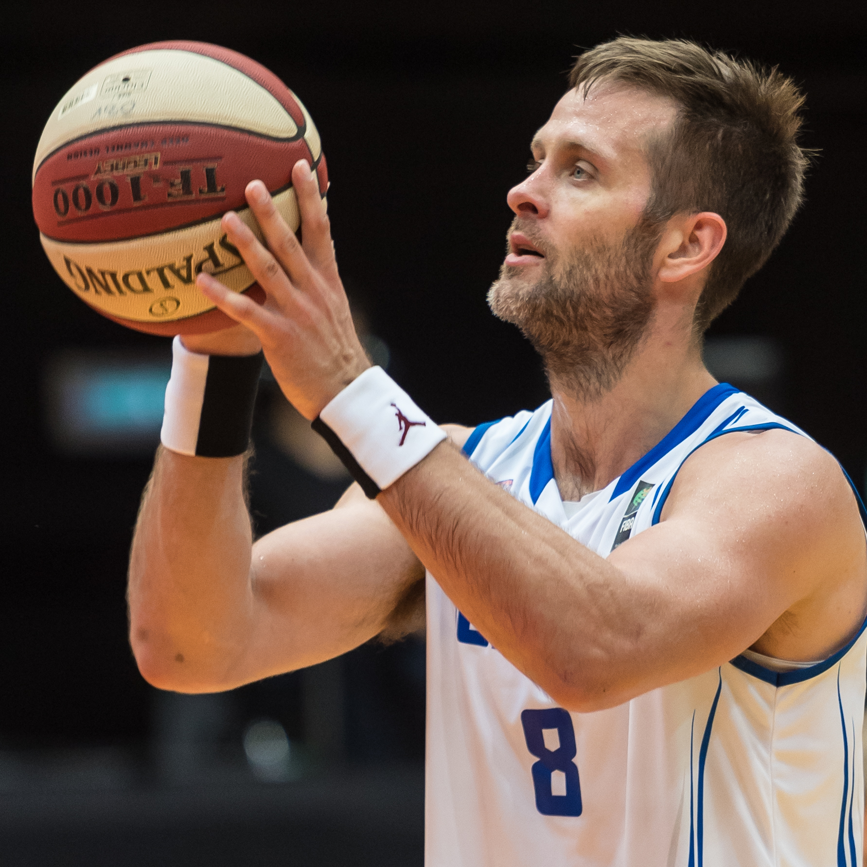 ÖBV Vier-Nationen-Turnier vom 12.-14. August 2016 in Schwechat - Island vs Slowenien. Bild zeigt Hlynur Baeringsson (ISL).